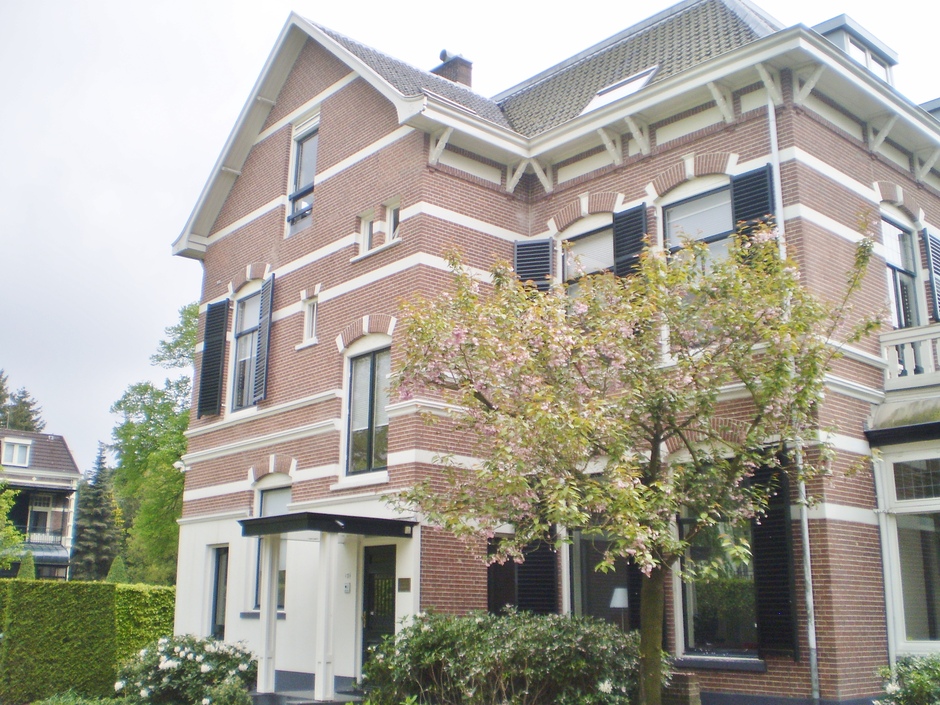 achterzijde